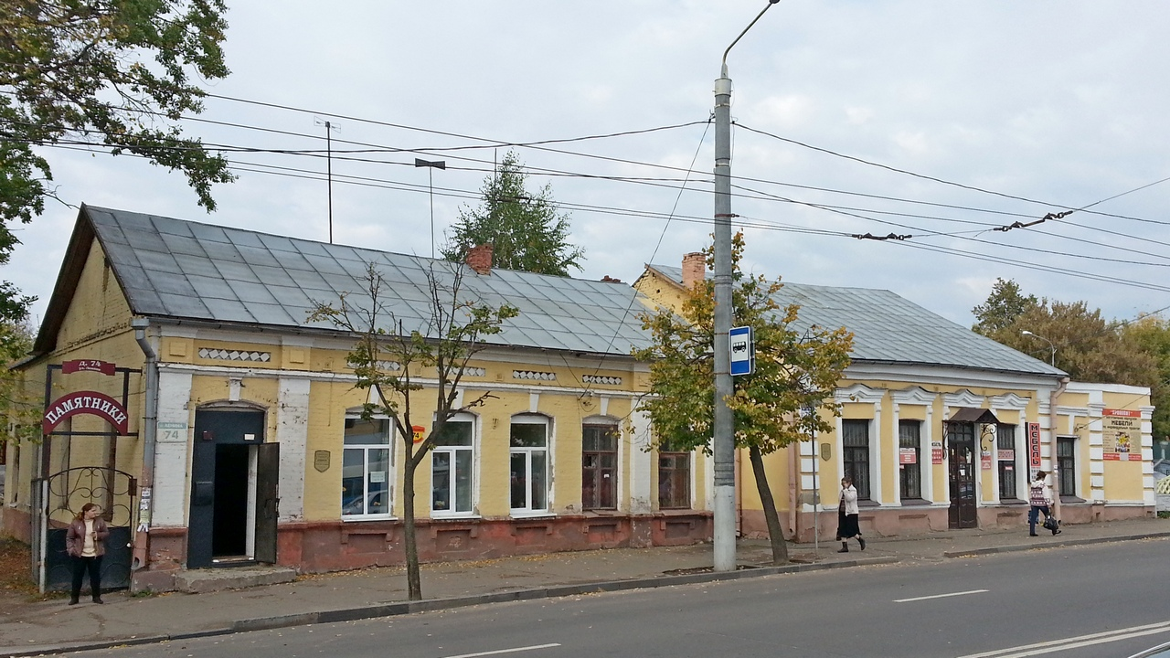 Беларуская (тарашкевіца): Забудова вул. Леніна. г. Віцебск This is a photo of Belarusian heritage monument. Reference number: 213Г000049 ( WLM)